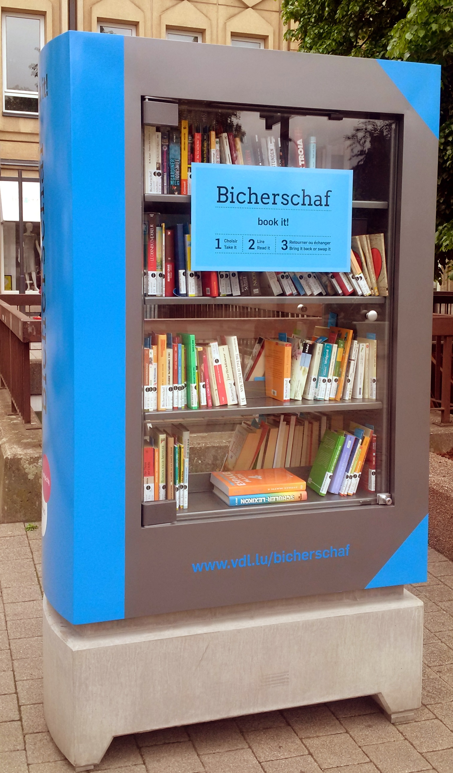 Ëffentlech zougängleche Bicherschaf op der Theaterplaz an der Stad Lëtzebuerg.